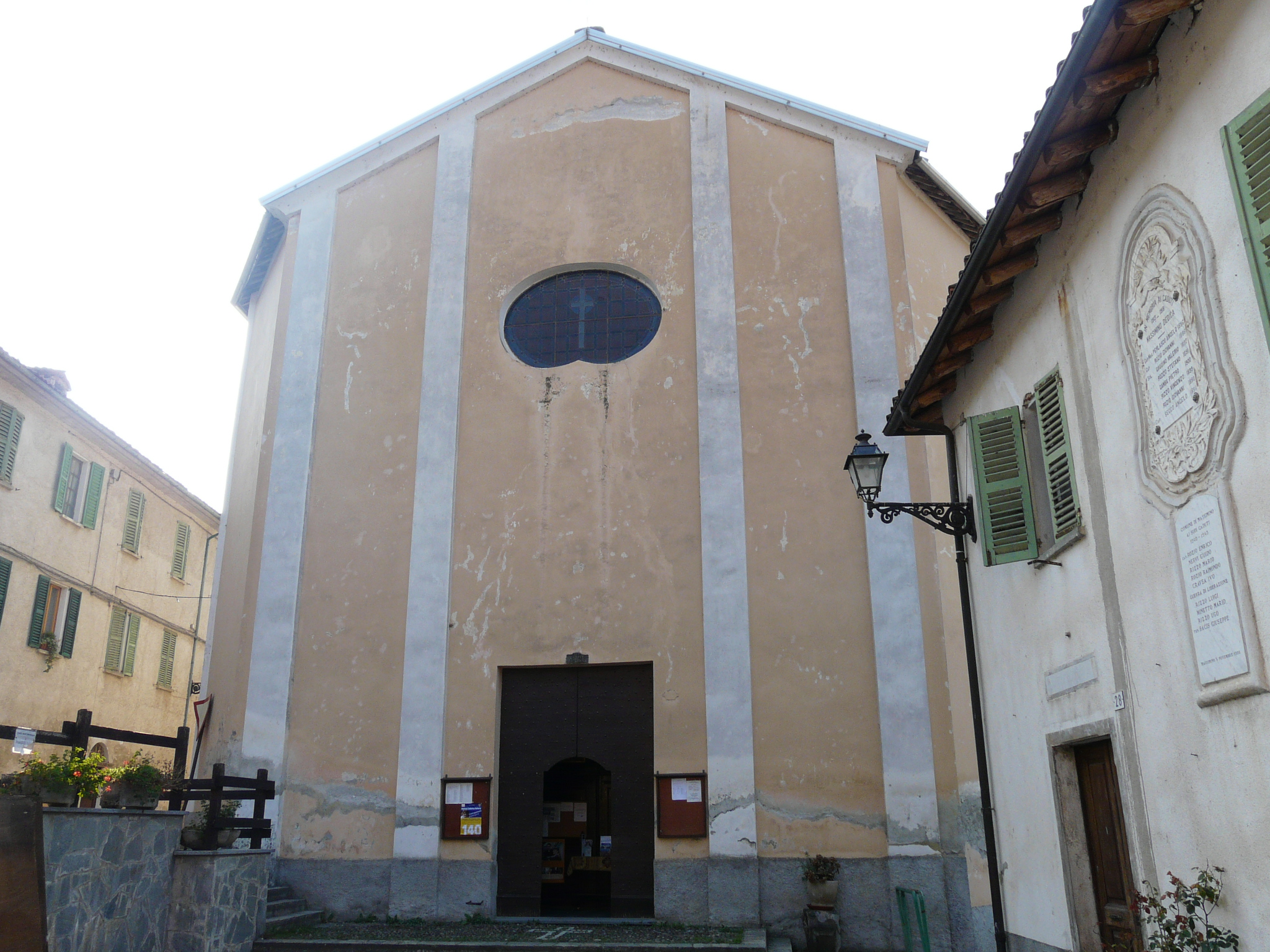 Chiesa di San Donato, Massimino, Liguria, Italia